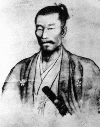 a Japanese man 平野国臣 (Kuniomi Hirano)